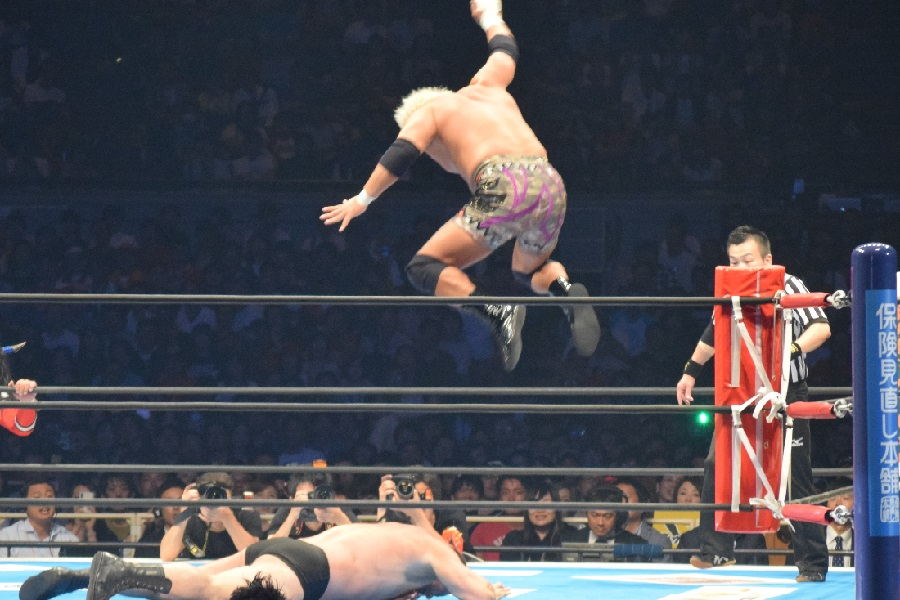 2017年6月11日 大阪城ホール「DOMINION 6.11 in OSAKA-JO HALL」 中西学にキングコングニードロップを放つ真壁刀義